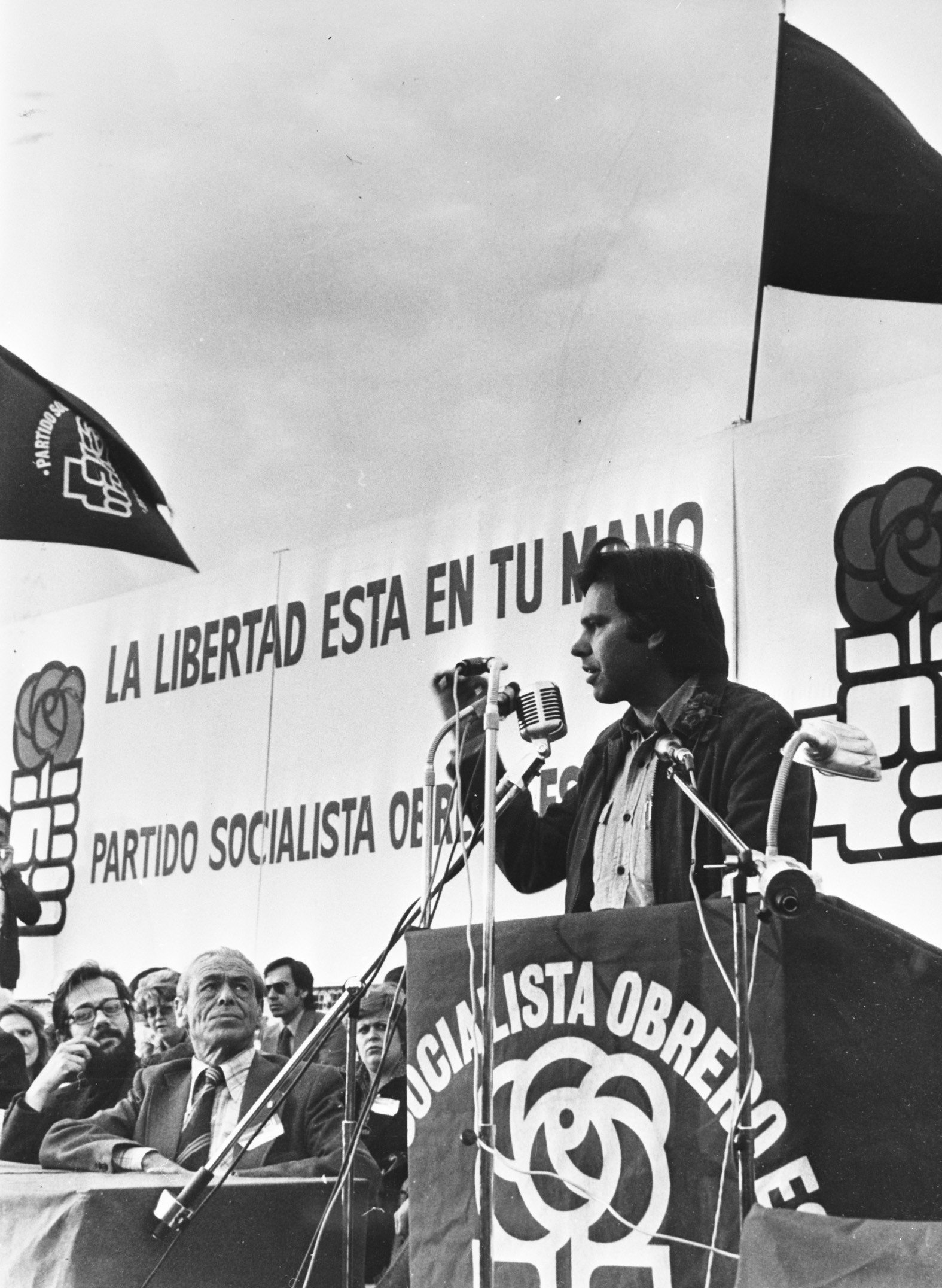 Collectie / Archief : Fotocollectie Anefo Reportage / Serie : [ onbekend ] Beschrijving : Spaanse verkiezingen; Felipe Gonzalez (PSOE) tijdens bijeenkomst Datum : 13 juni 1977 Locatie : Spanje Trefwoorden : bijeenkomsten, verkiezingen Instellingsnaam : PSOE Fotograaf : [onbekend] Auteursrechthebbende : Nationaal Archief Materiaalsoort : Negatief (zwart/wit) Nummer archiefinventaris : bekijk toegang 2.24.01.04 Bestanddeelnummer : 929-2260